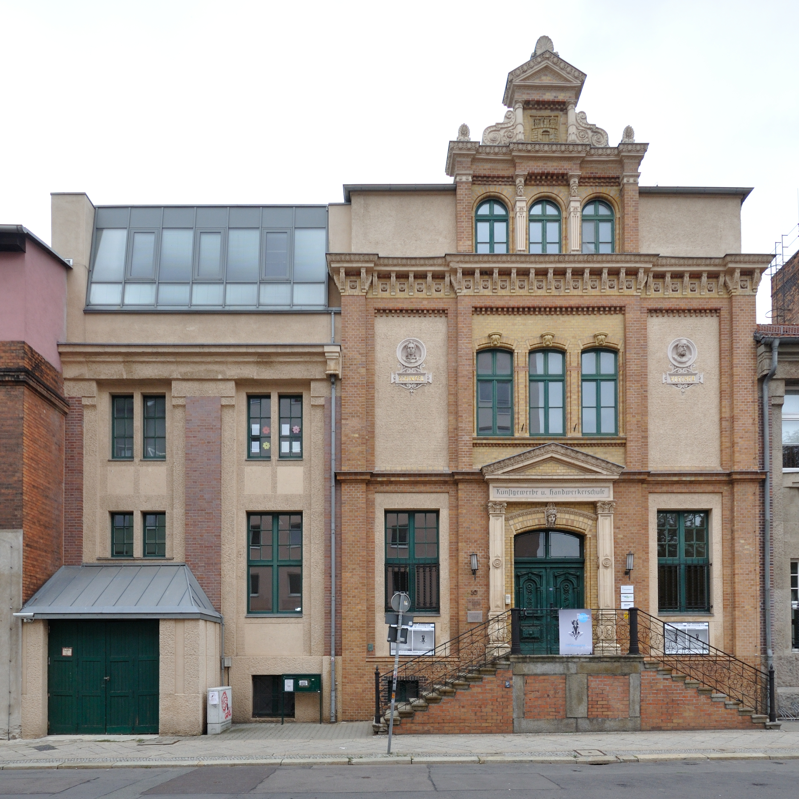 Kunstgewerbe- und Handwerkerschule Brandenburger Straße 10 in Magdeburg-Altstadt. This is a photograph of an architectural monument.It is on the list of cultural monuments of Magdeburg